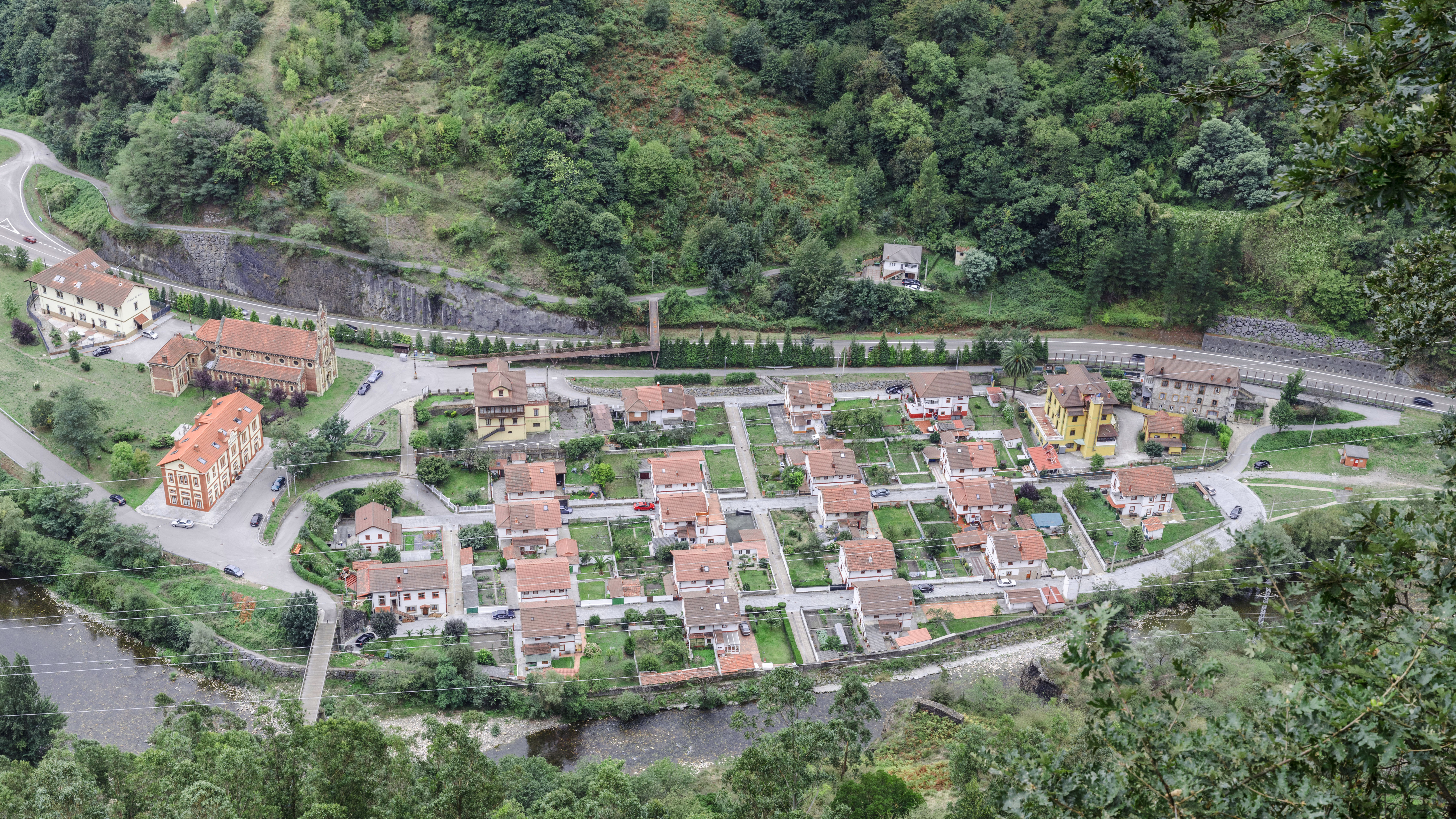 Vista panorámica del poblado de Bustiello. Concejo de Mieres